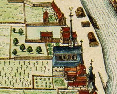 Extrait de la carte de Blaeu: Couvent des Augustins de Liège sur Avroy